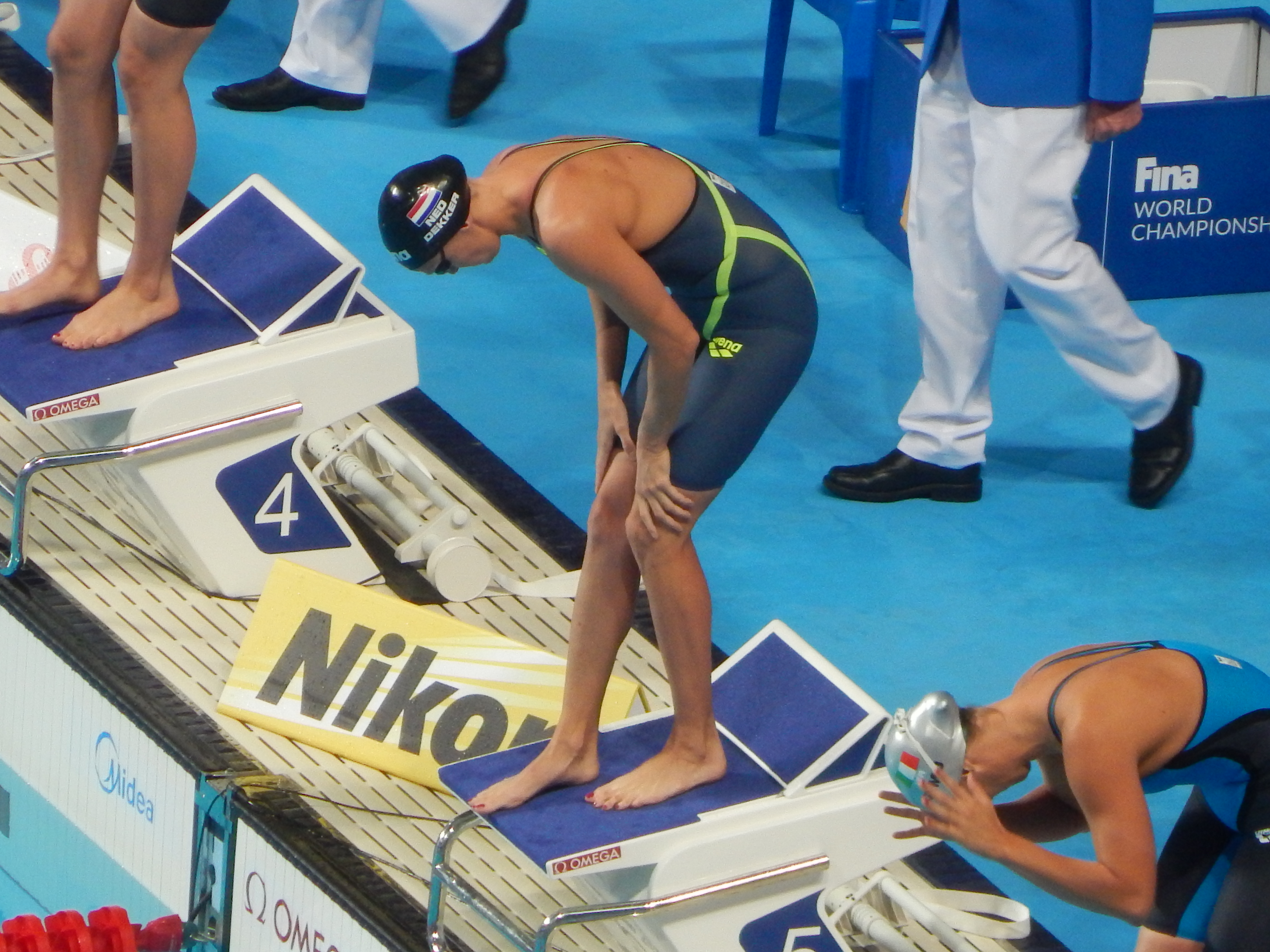 Заплыв на чемпионате мира в Казани баттерфляем 50 метров полуфинал